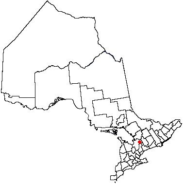 Volapük: Topam in provin: Ontario.